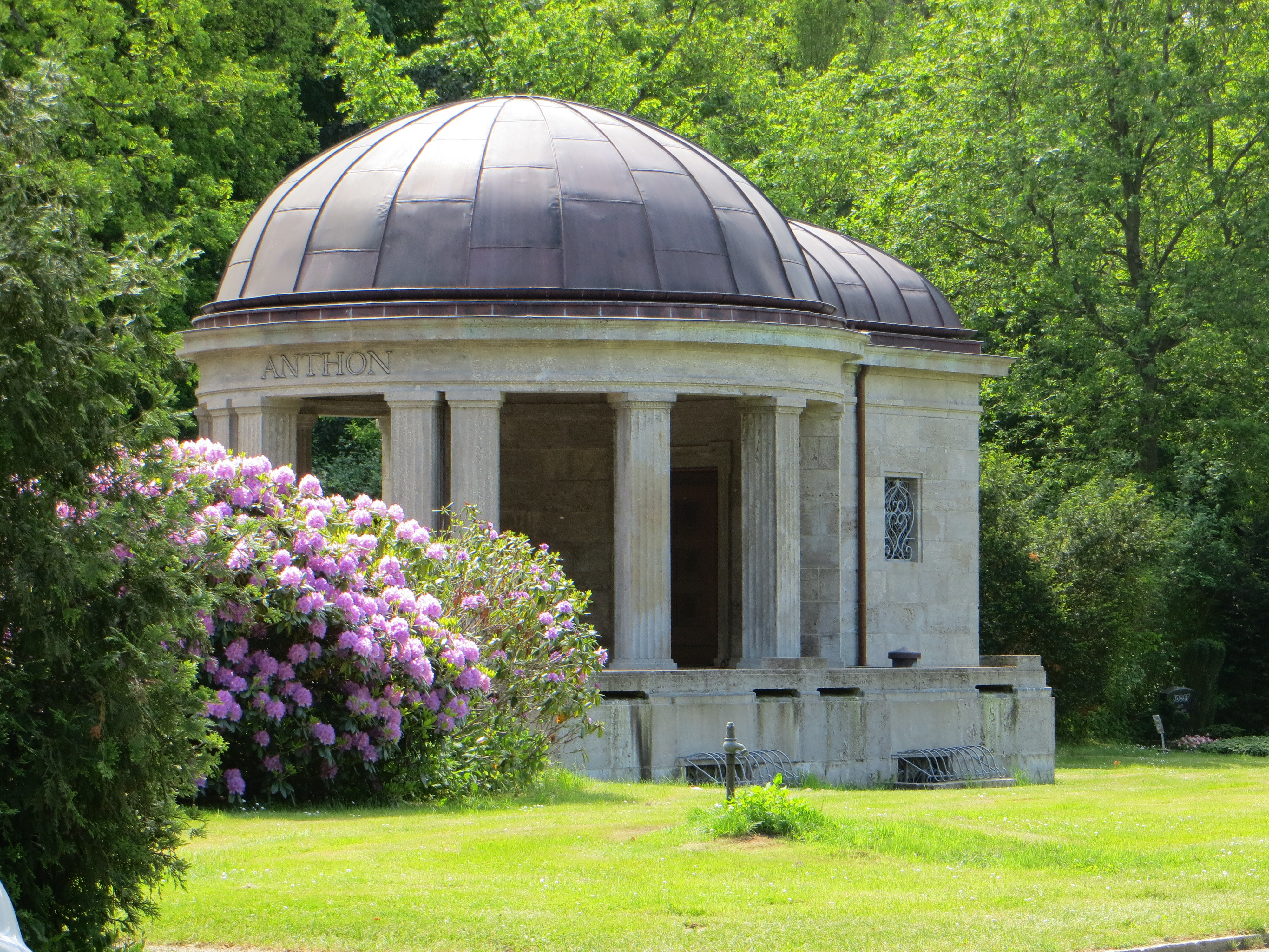 Gruft auf dem Friedenshügel iN Flensburg